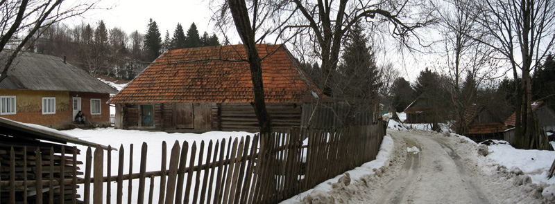 Улица в селе Пилипец, Закарпатье